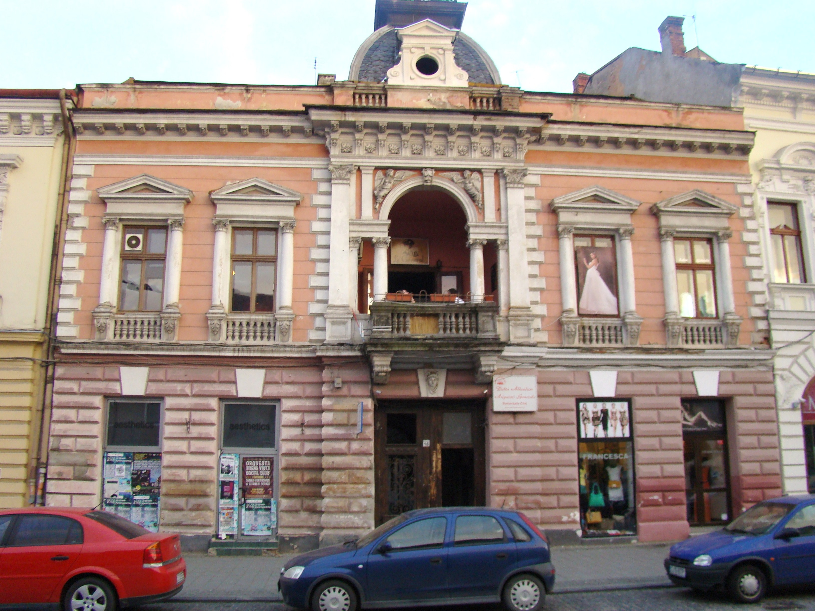 Clădire monument istoric, Bd.Eroilor, nr.18